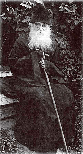 Владыка Антоний (Абашидзе) в день приезда в Лавру